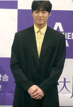 1월 3일 오후 서울시 강남구 논현동 임피리얼 팰리스 서울에서 채널A 새 금토드라마 '터치' 제작발표회가 열려 배우 주상욱 김보라 이태환 한다감 변정수가 참석해 포토타임을 갖고 있다.